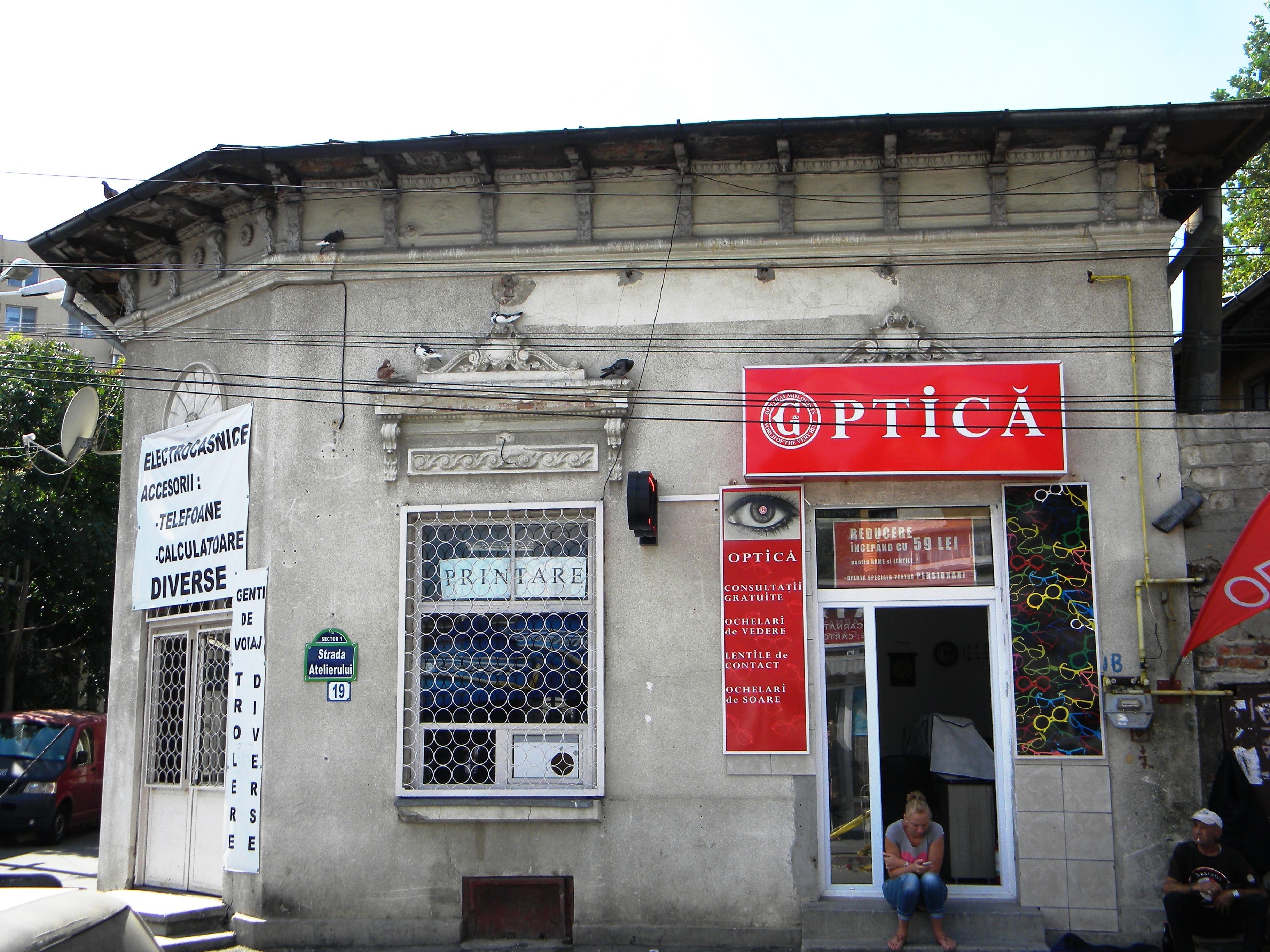 Bucuresti, Romania, Str. Atelierului nr. 19, sect. 1; B-II-m-B-18010